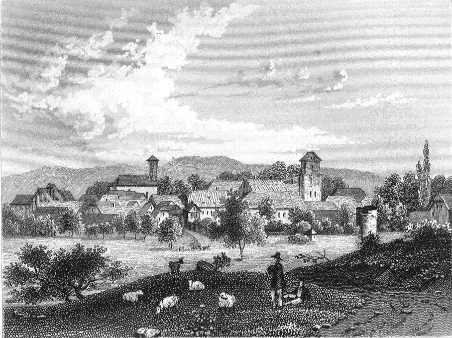 Staden, 1849, Stahlstich auf Papier · schwarz-weiß